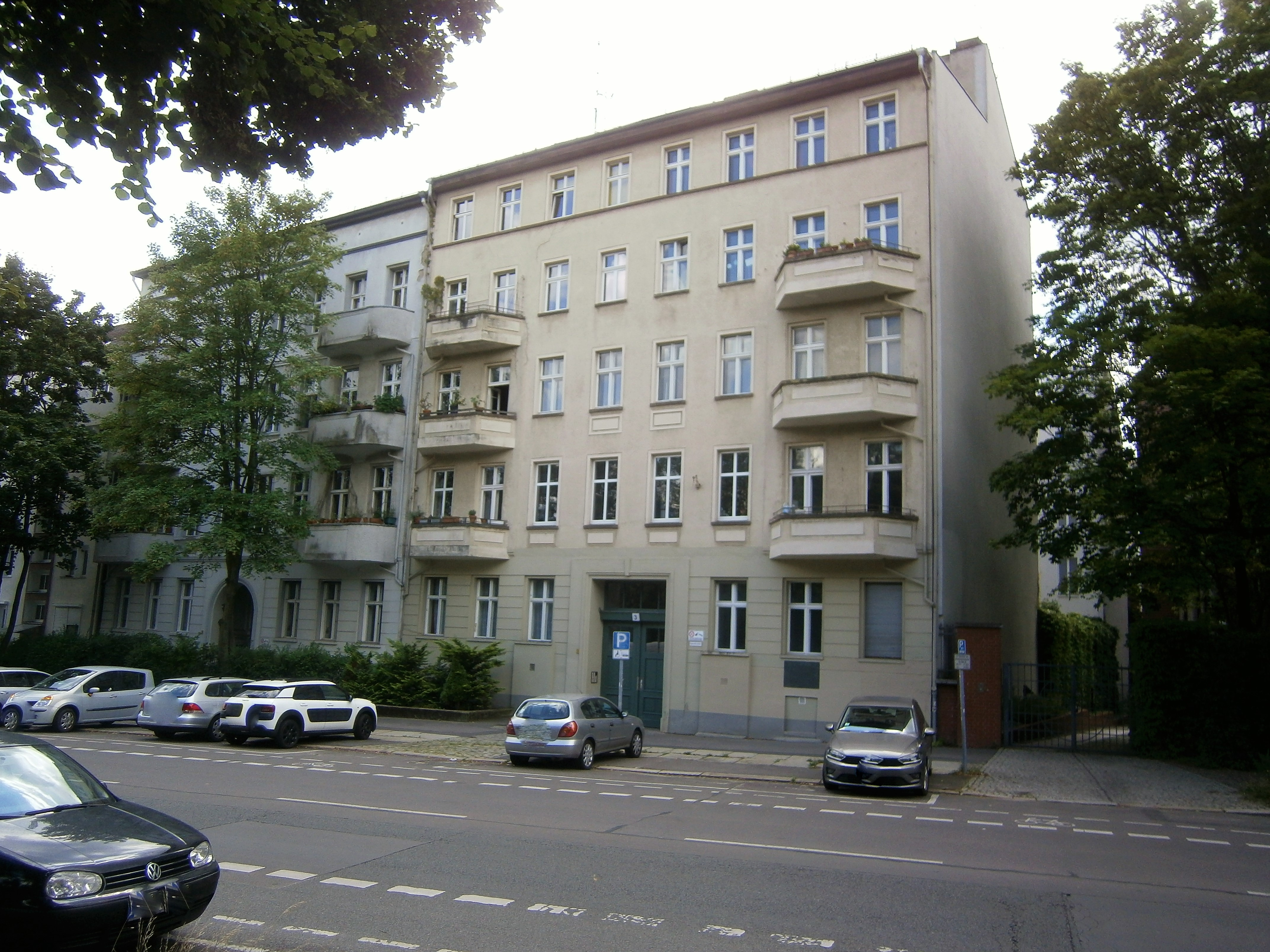 Die Friedenstraße ist eine Straße im Berliner Bezirk Friedrichshain-Kreuzberg, Ortsteil Friedrichshain. Angelegt und benannt wurde sie 1871-1876 auf dem Communicationsweg außerhalb der abgerissenen Berliner Zollmauer. Bereits seit dem Anlegen und der Bebauung bestand eine Teilung der Straße auf Königstadt und Stralauer Viertel. Aktuell sind es drei unterschiedene Straßenabschnitte: regionale Straßenverbindung im Barnimkiez am Volkspark Friedrichshain, am Platz der Vereinten Nationen als Parkzone, südlich im (Planungsraum) "Friedenstraße" als Ergänzungsstraße. Das Bild zeigt den Altbau Friedenstraße 3.